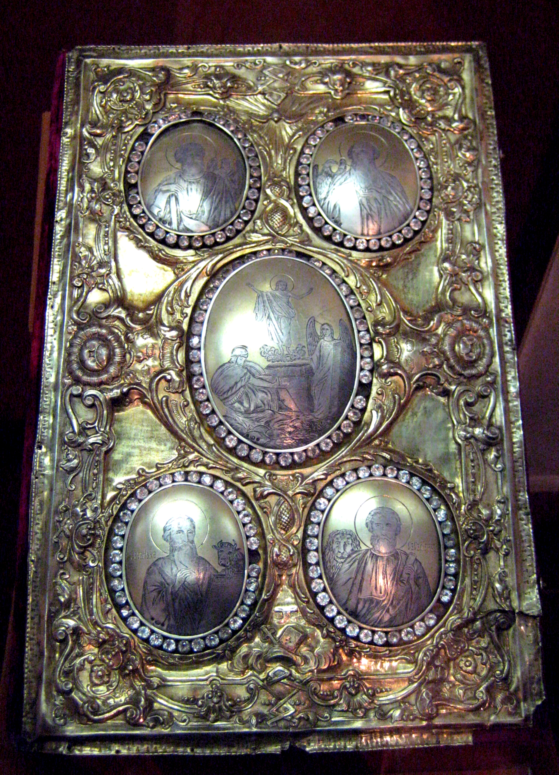 Напрестольное Евангелие, 18 век